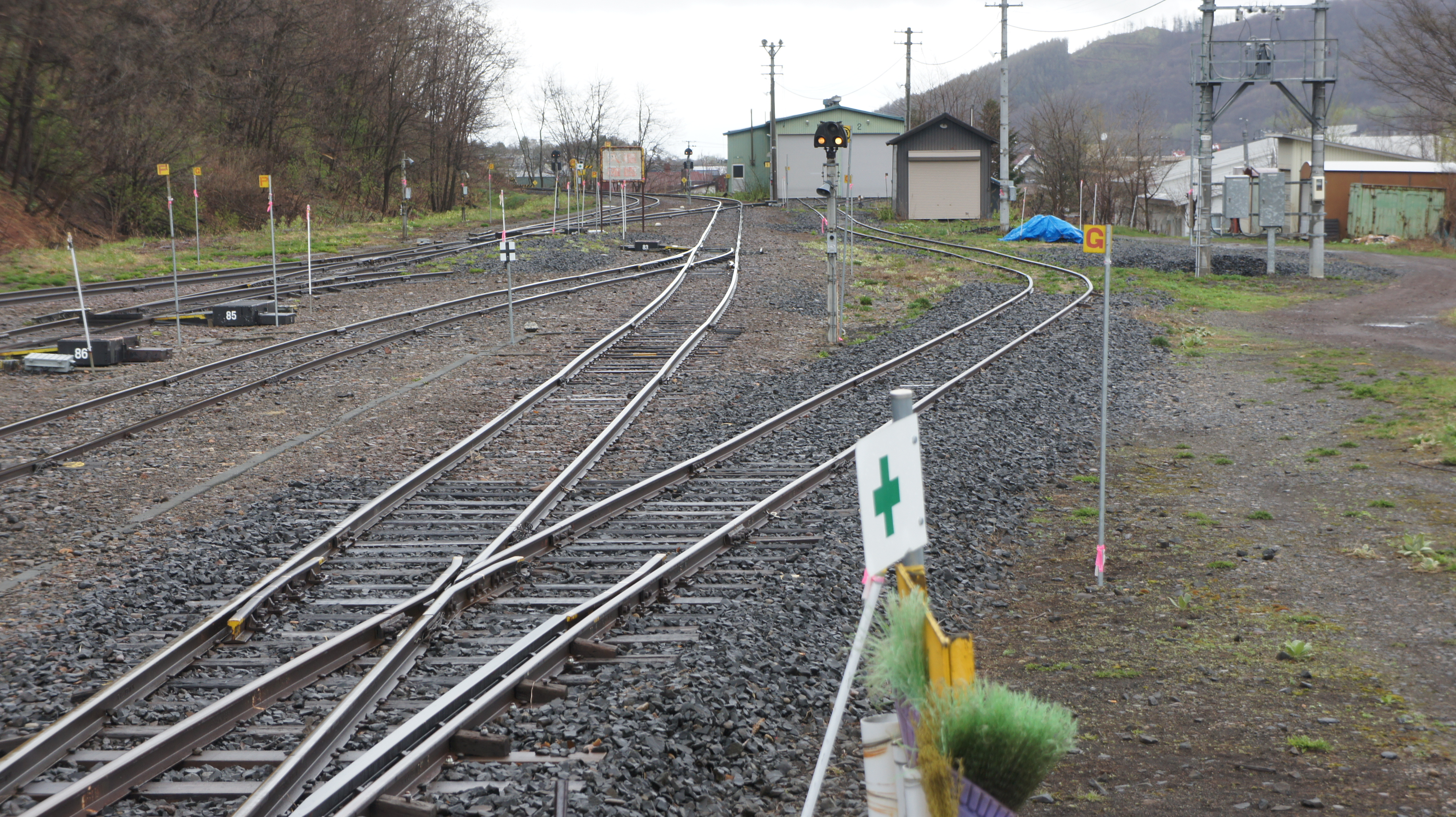 JR石北本線・遠軽駅の線路終端側（旧名寄方面）